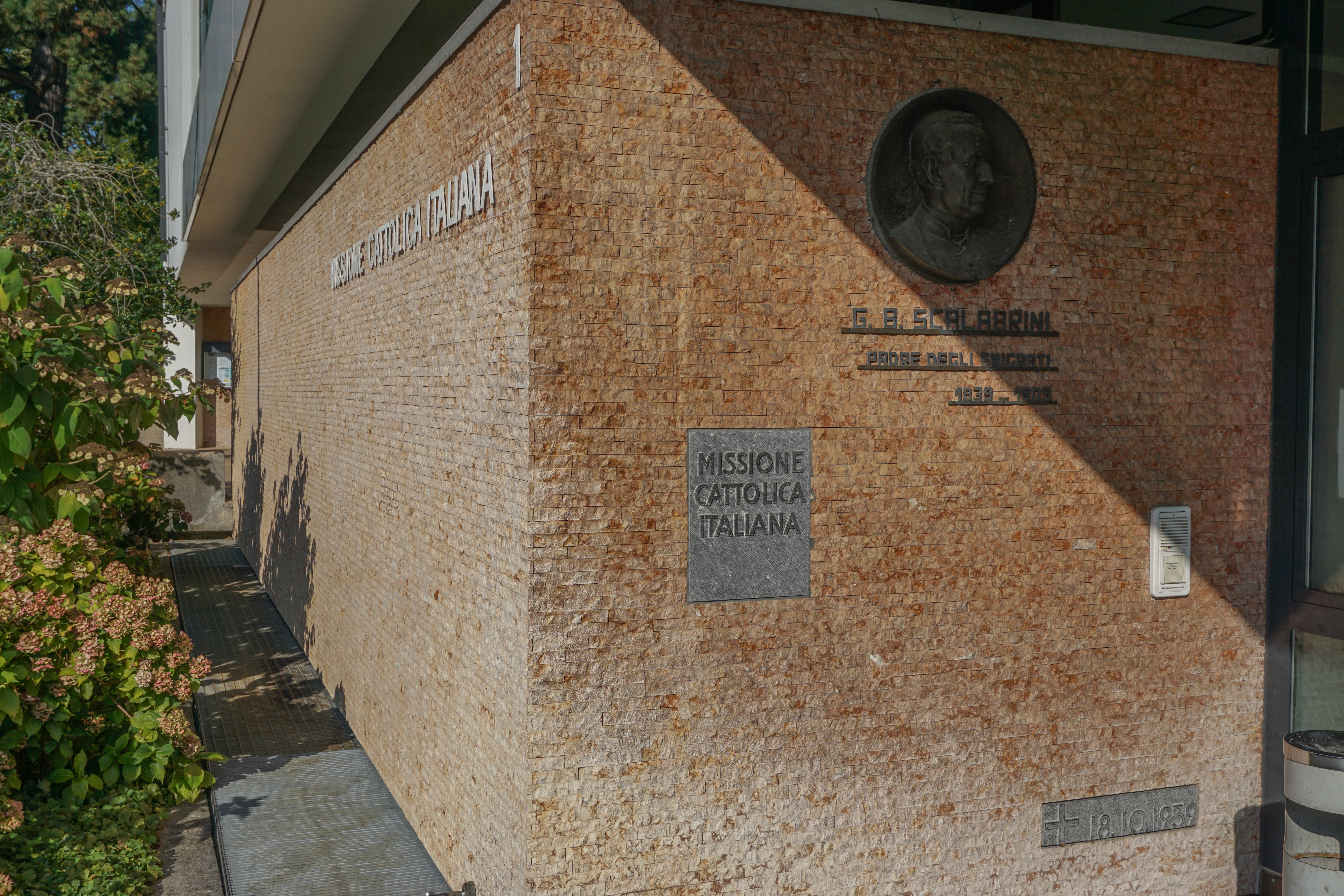 Sockelgeschoss beim Eingang der Missione Cattolica in Bern.